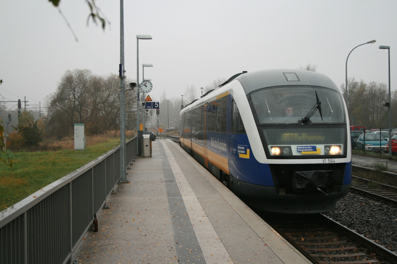 VT 564 (Desiro) der Märkischen Regiobahn in Brandenburg